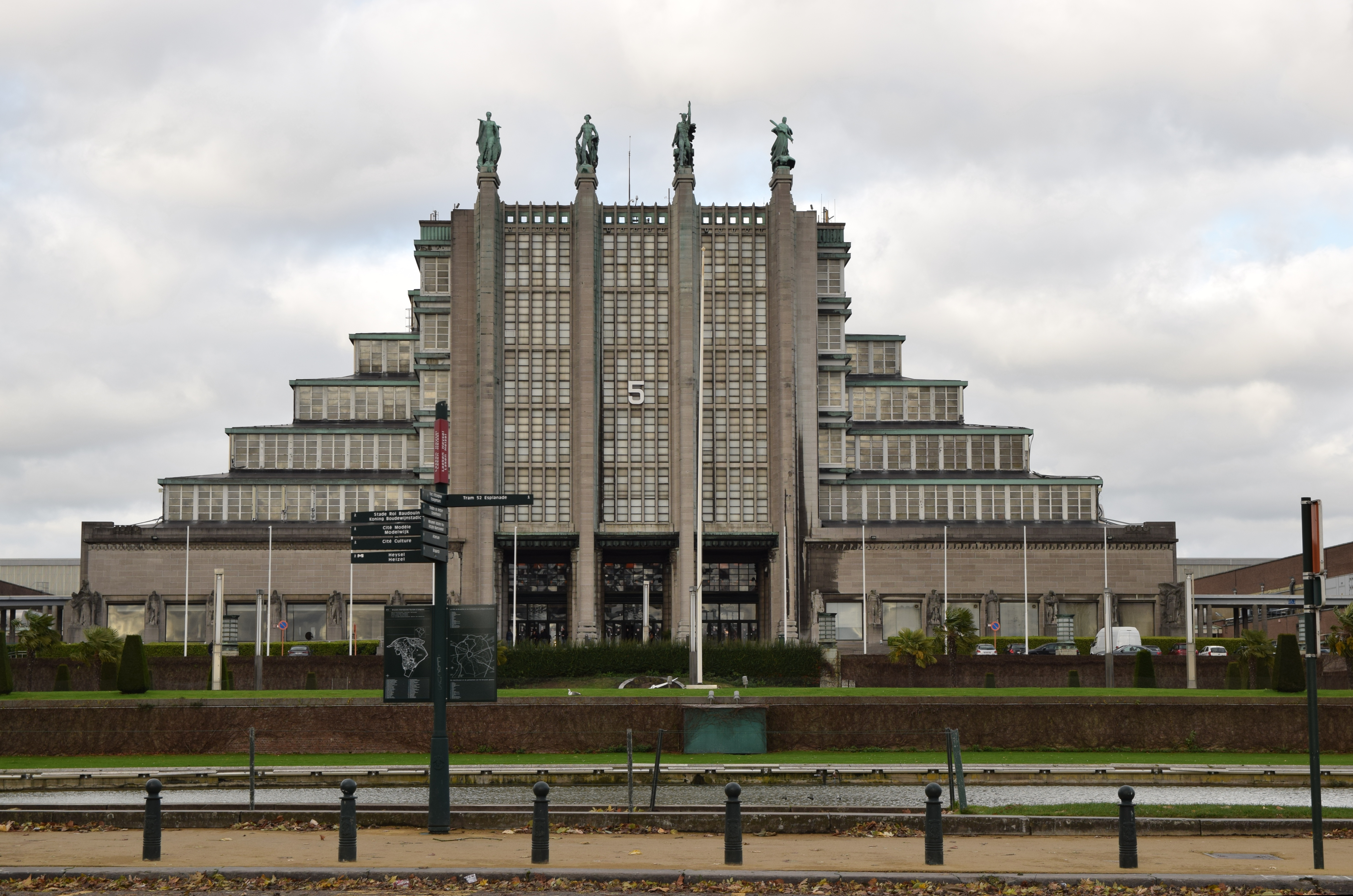 Expopaleis 5 Heizel Brussel